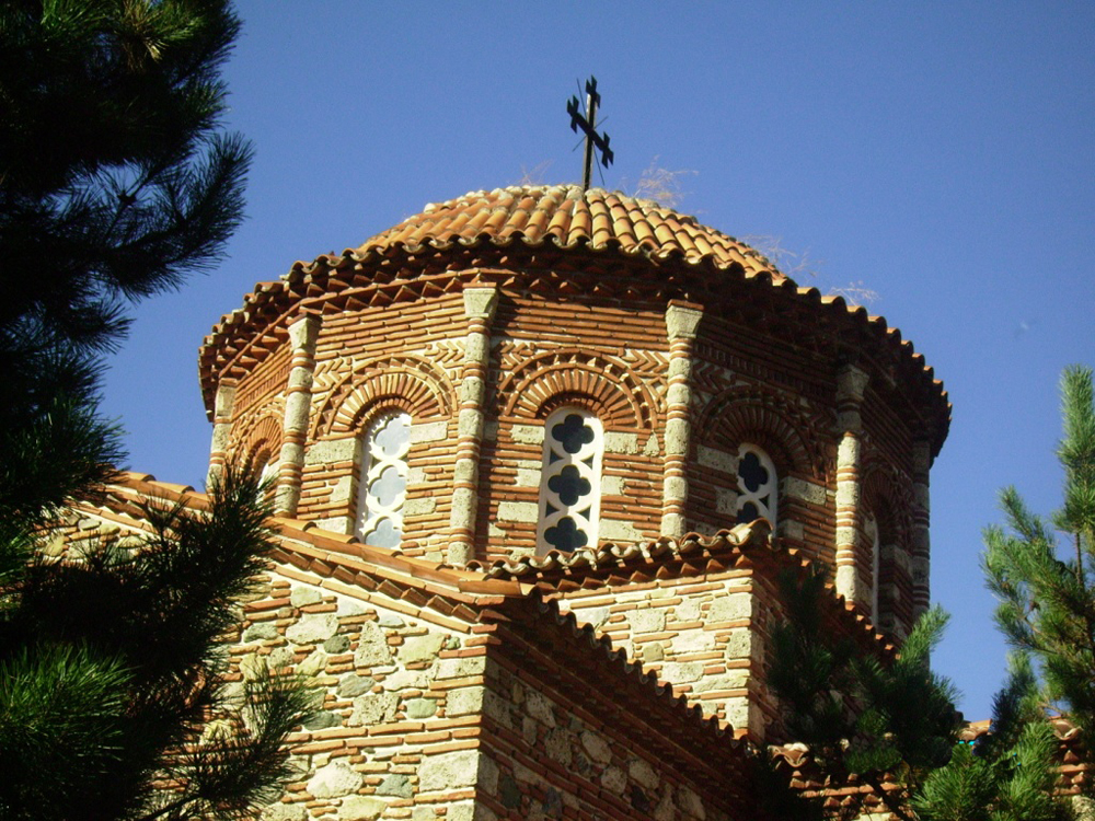 Црква Свети Леонтие Водоча